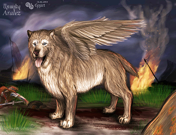 Аралез, киноцевал. Существо из армянской мифологии. Эти собаковидные существа воскрешали павших воинов в боях.